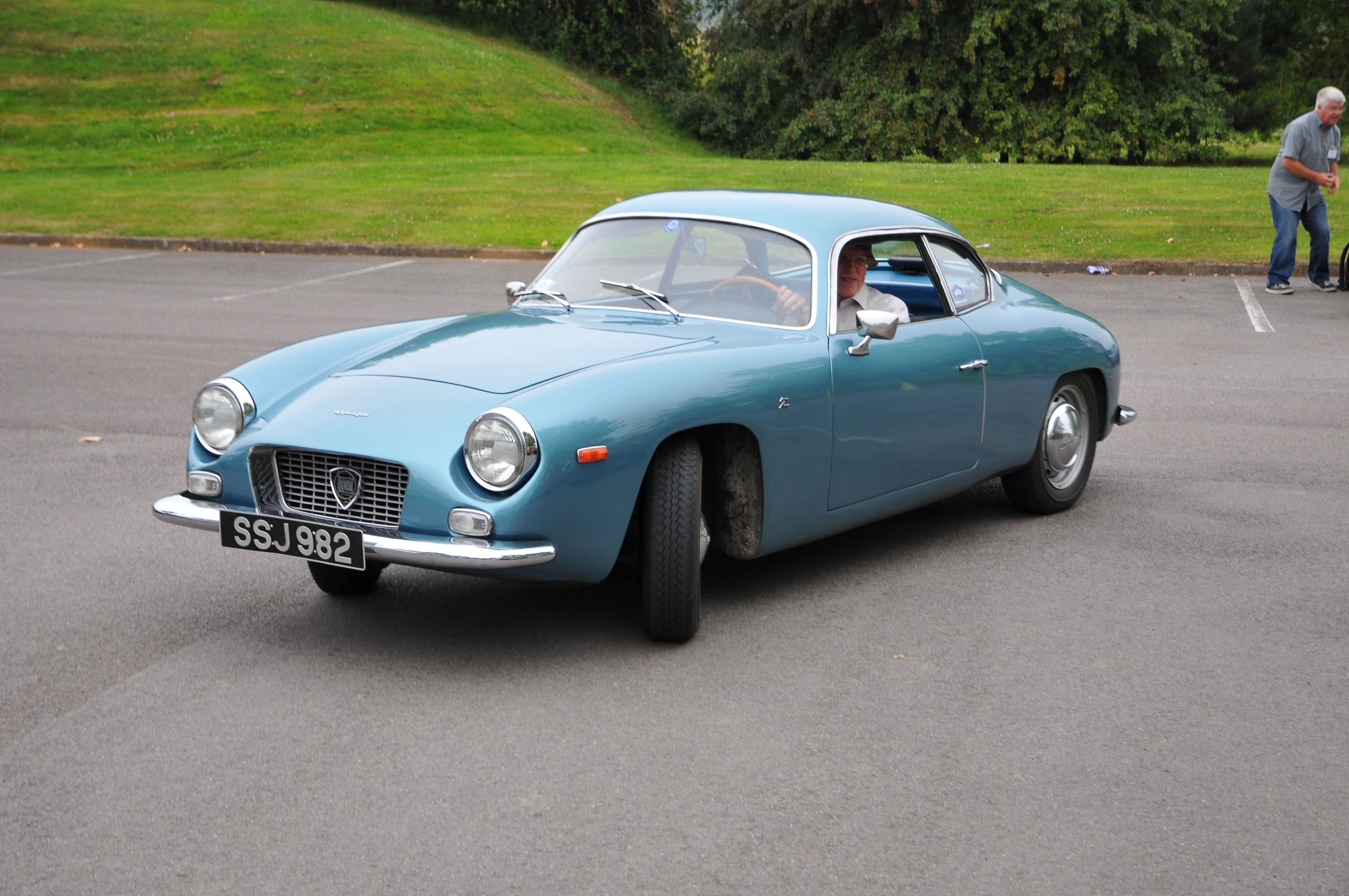 Lancia Motor Club AGM 2011